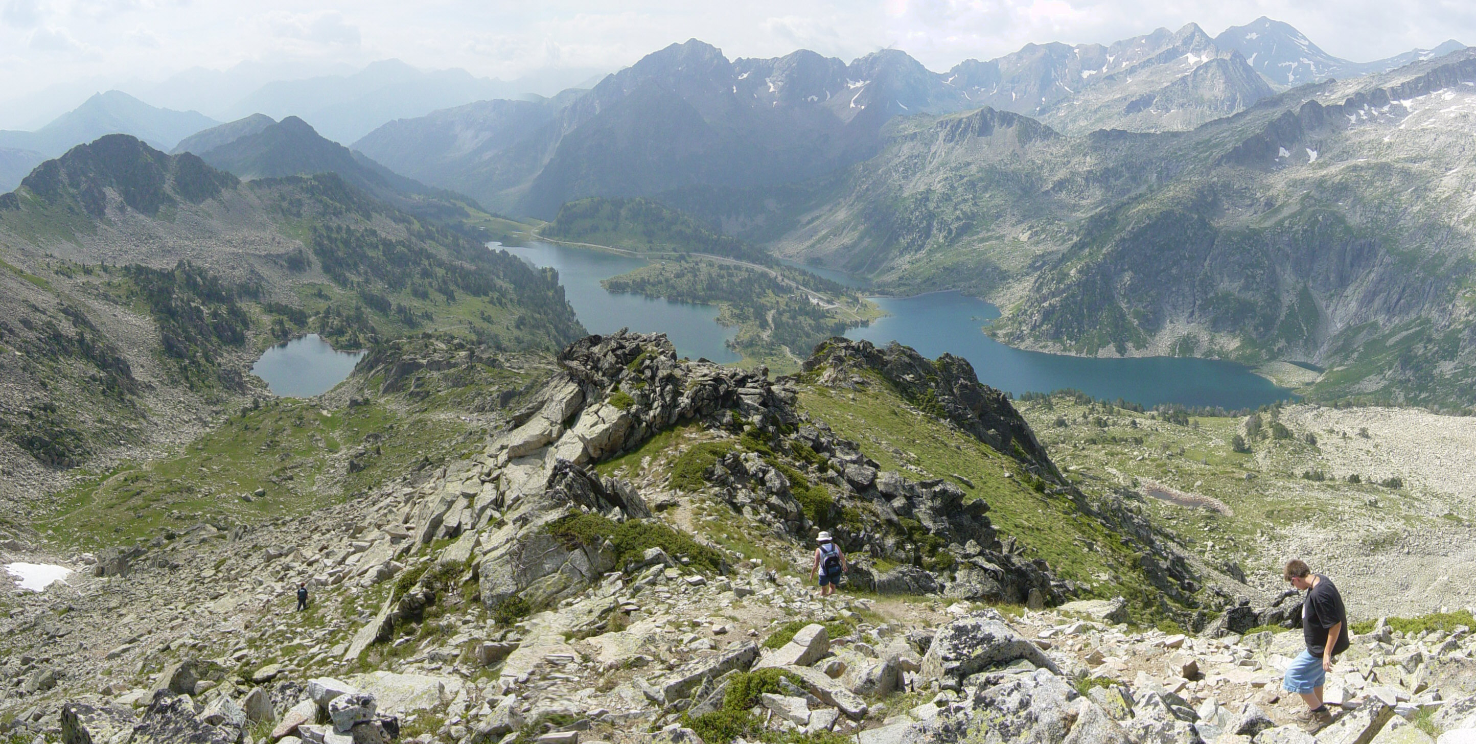 Vue du Col de Madamette sur les lacs d'Aumar et d'Aubert dans le massif du Néouvielle. En second plan, de droite à gauche, le Pic de Campbielh, le massif des Halharisès, le chainon Pic d'Estaragne, Pic Méchant, Bugatet. En arrière plan, de droite à gauche le Pic d'Aret (vallée d'Aure) et le massif des Gourgs-Blancs (massifs de Luchon et du Louron).